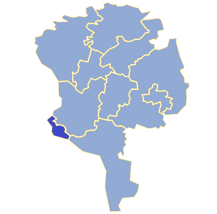 Powiat żarski - Gmina Łęknica